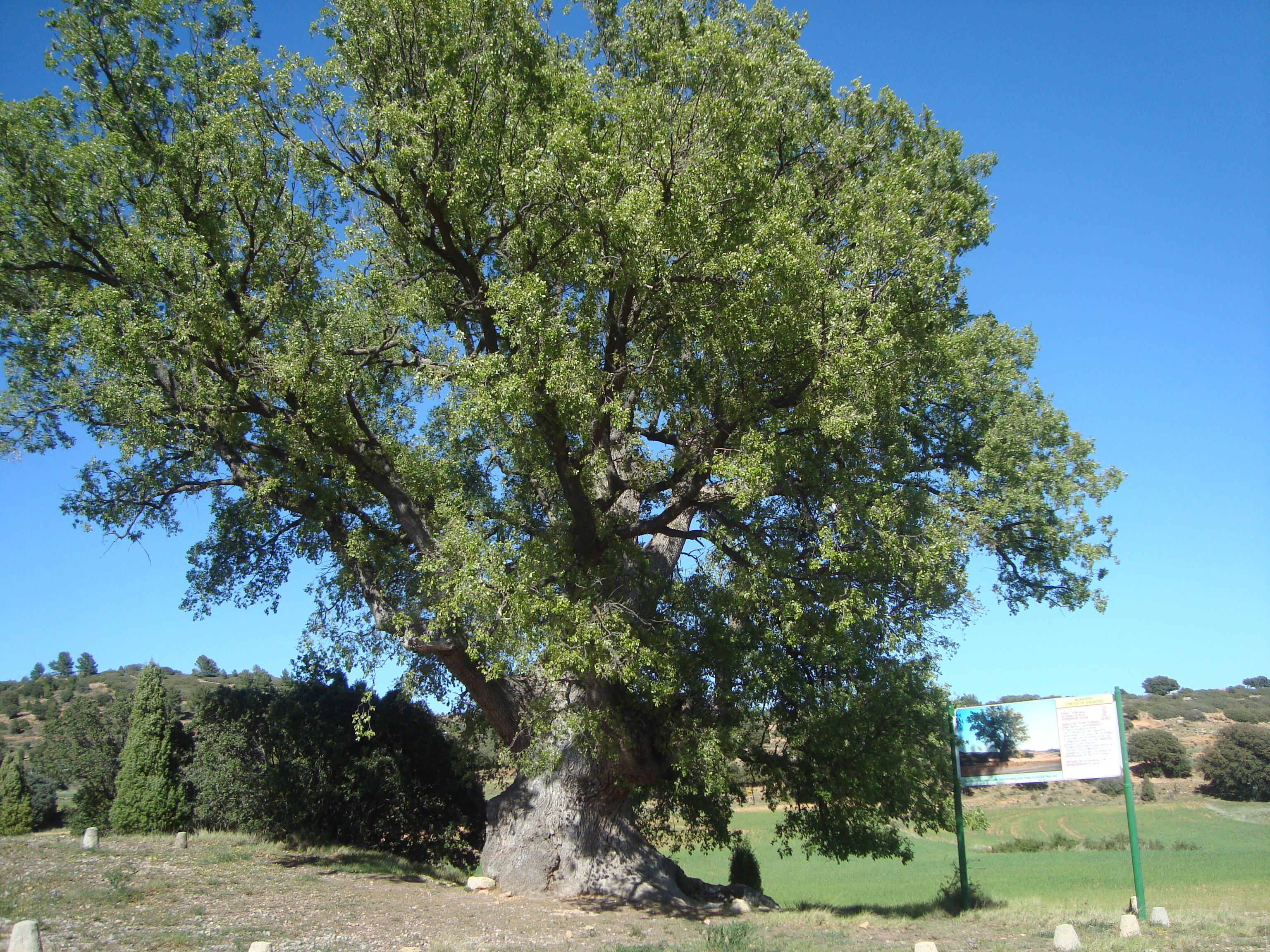 Roble monumental "El Rebollo" (Caserio Azafraneros, Cortes de Arenoso). El nombre de este árbol monumental es "El Rebollo", tiene más de 700 años de edad siendo de su especie (Quercus faginea) el ejemplar más viejo de España..